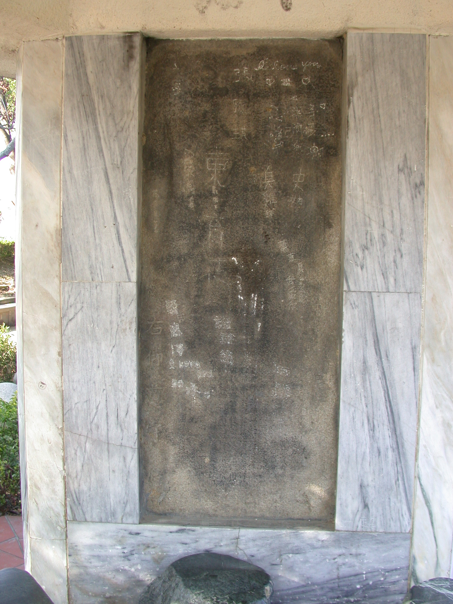 Bân-lâm-gú: 臺中潭子石牌公園潭陽亭內底的阿里史社(Rarusai)碑，抑是講做嚴禁北路理番弊端碑，清乾隆三十五年的歷史文物，一寡囡仔煞烏白共皂，面頂原本的字會使參考新石碑。